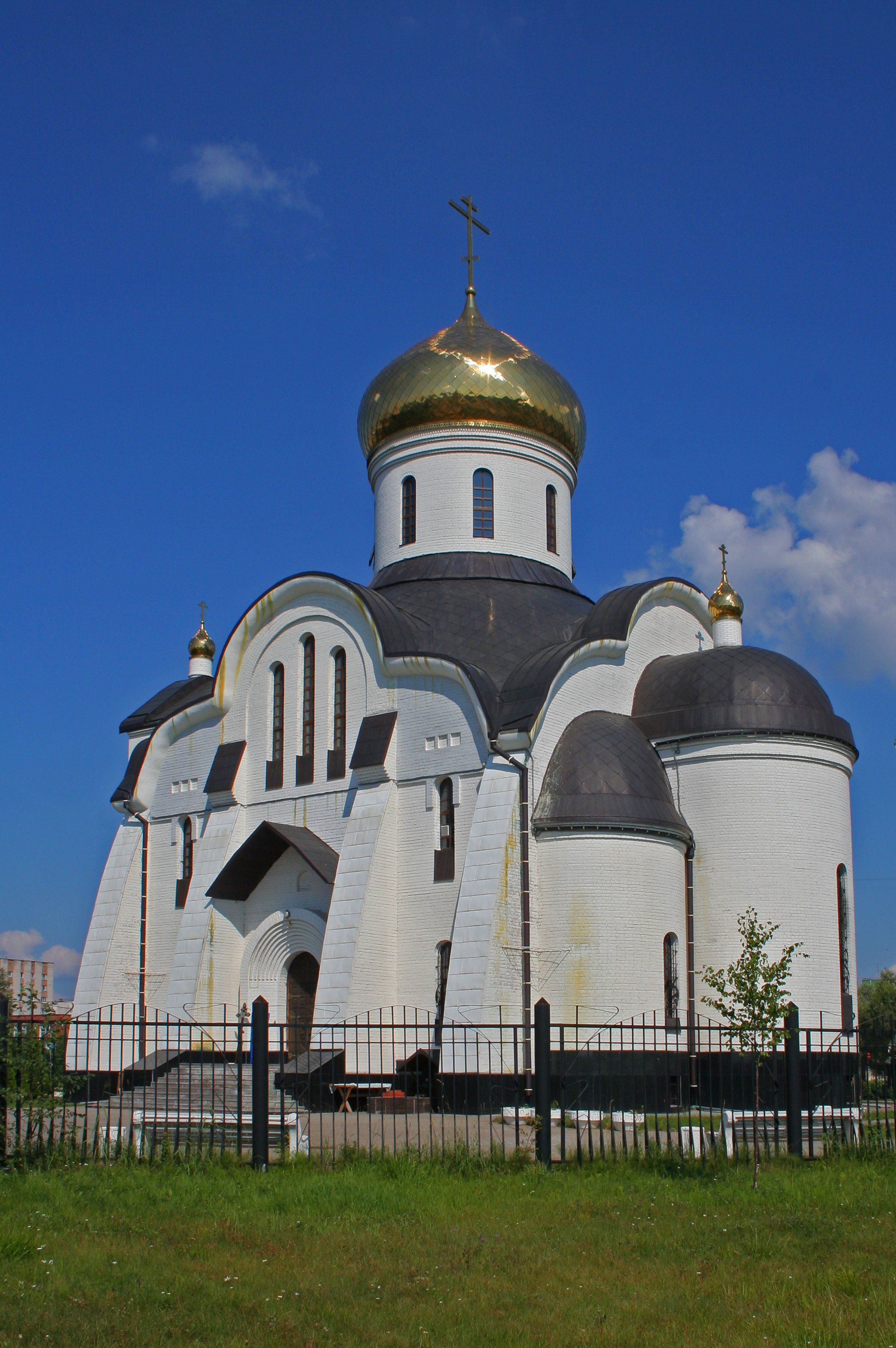 Stadt Udomlja (Oblast Twer, Russland). Fürst-Wladimir-Kathedrale.